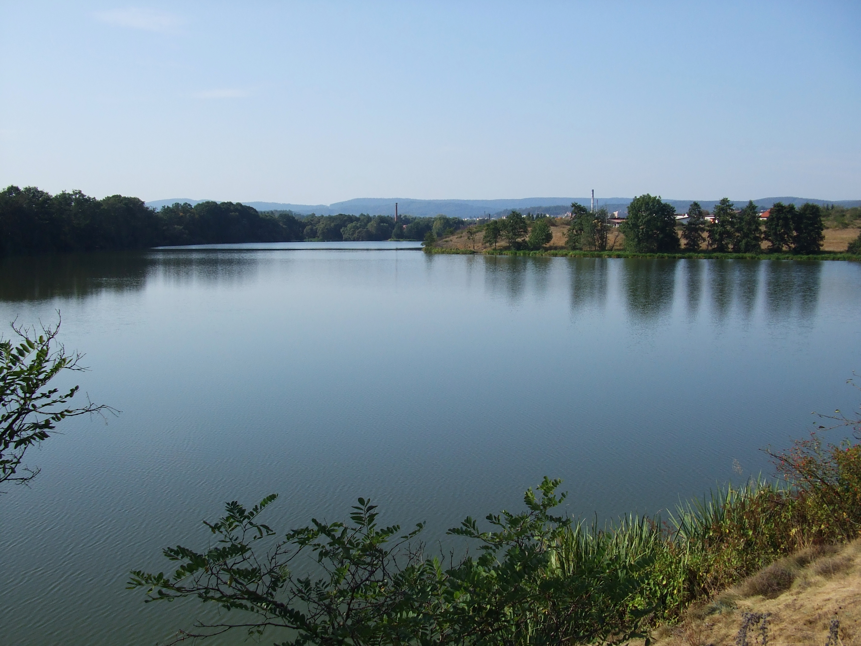 Rybník Strž od Čapkova Památníku